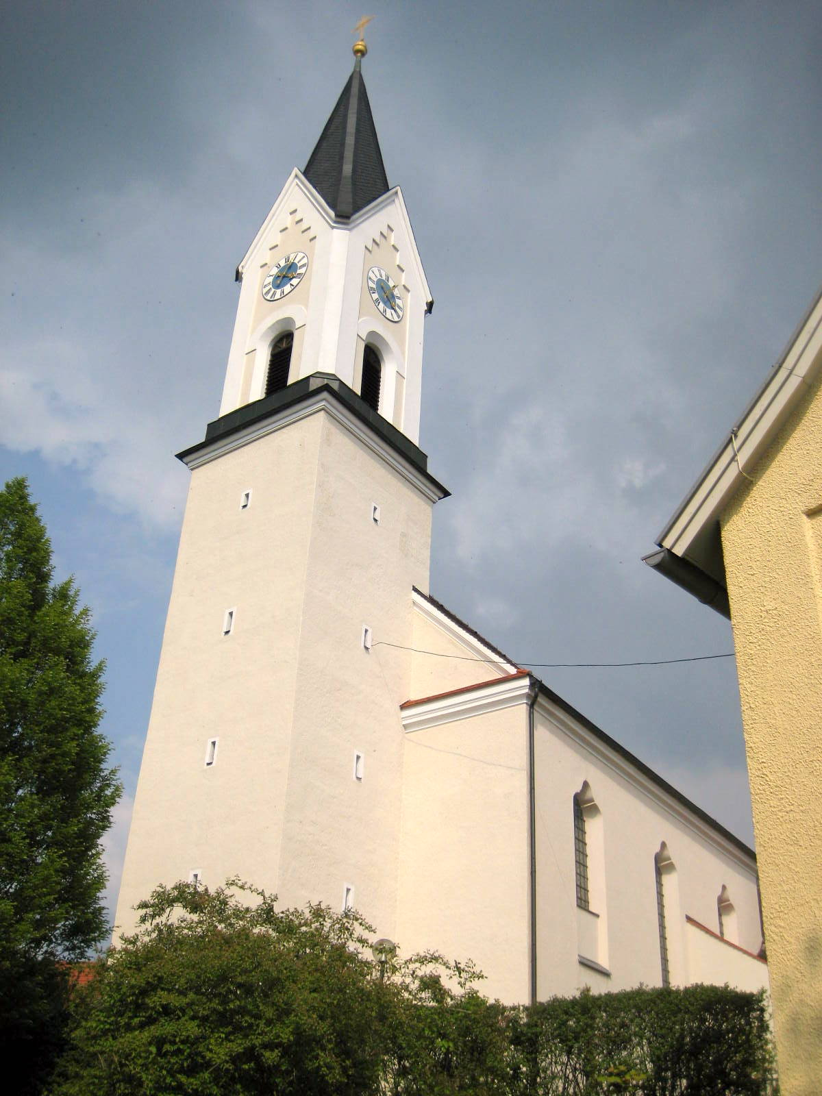 Das ist der Kirchturm von Attenkirchen, der weit zu sehen ist, da er auf einem Hügel steht.